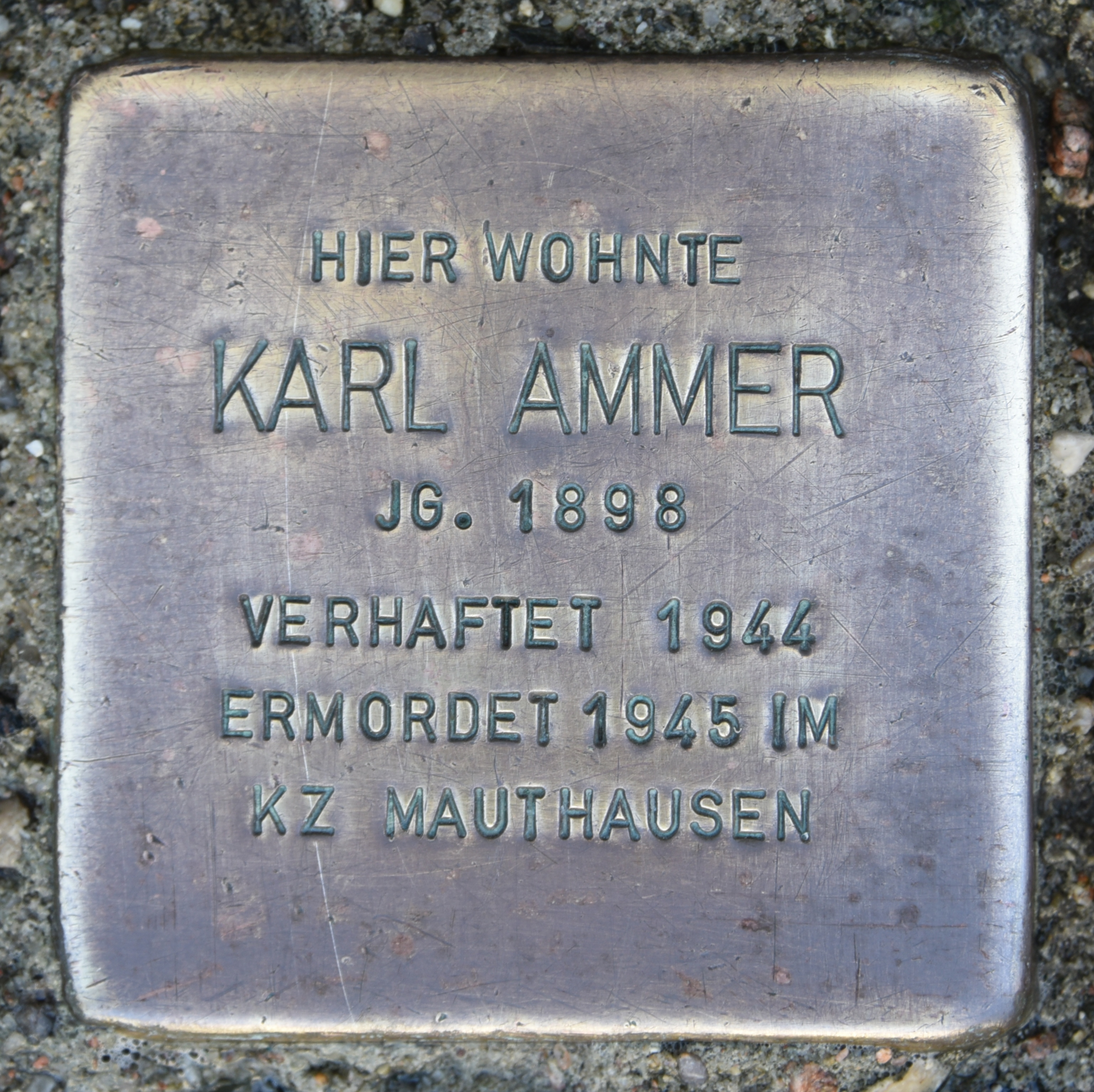 Stolperstein für Karl Ammer